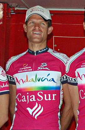 Francisco José Martínez. Andalucía-Cajasur, Euskal Bizikleta 2008